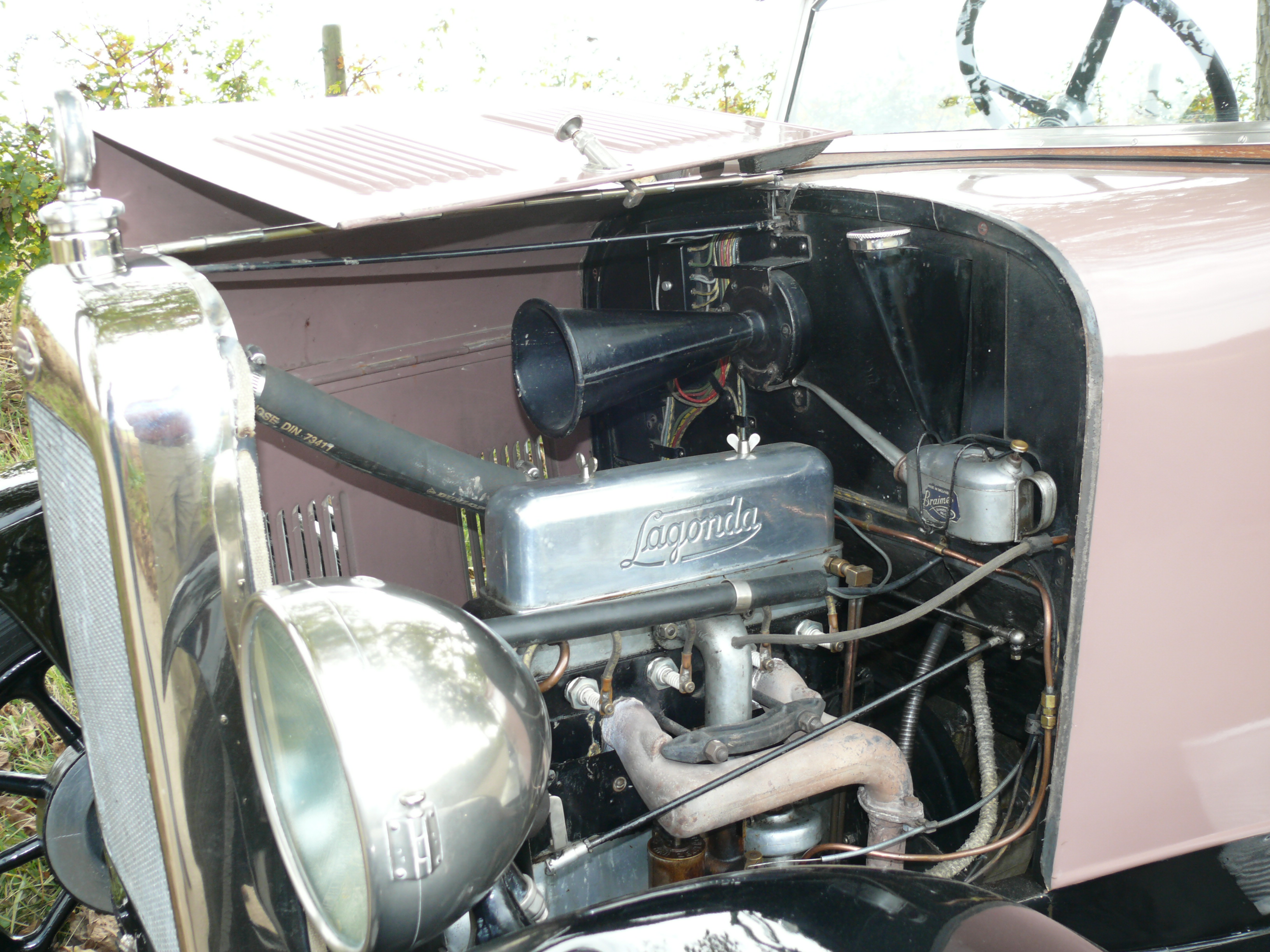 Lagonda 12/24LC tourer 1925 LC indicates this car is a tourer and has a monocoque construction. The saloon 12/24 S has a separate chassis as some of the later models. All 12/24 cars were build with a factory body.